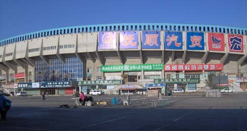 Fushun LeiFeng Playground